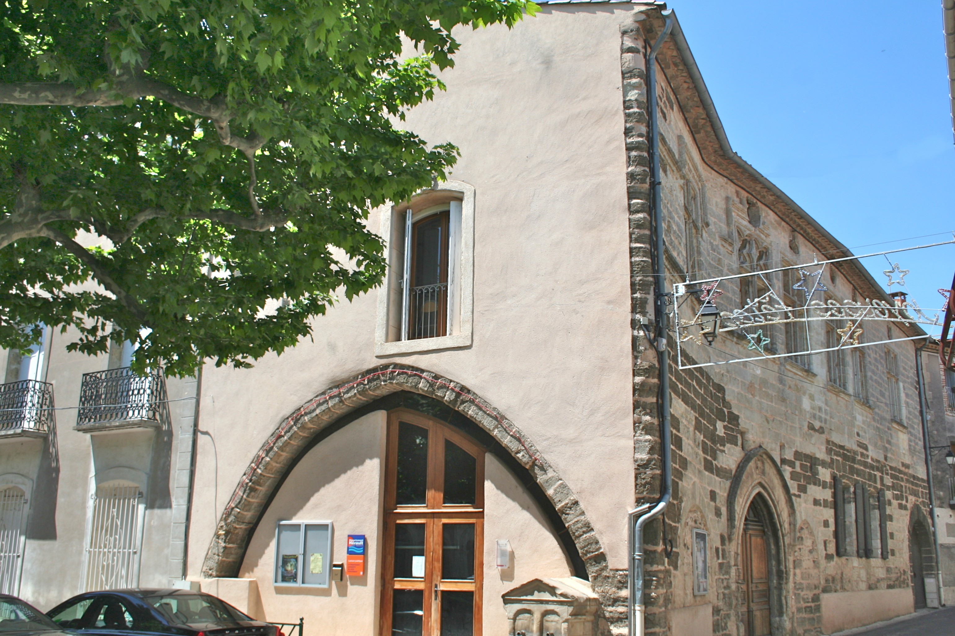 Aspiran (Hérault) - maison du viguier (XVe siècle) - vue latérale